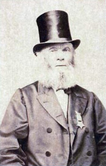 Fidel Schlund (* 19. Februar 1805 in Immenstadt; † 2. April 1882 in Newark (New York)) war ein deutscher Aufklärer an der Spitze der revolutionären Bewegung 1848, dessen Einfluss einen blutigen Aufstand im Allgäu verhinderte. Er gehörte als Kämpfer für Freiheit und Demokratie zu den „Forty-Eighters“, die nach Nordamerika auswanderten und sich dort mit ihrer Familie in den Dienst eines neuen und fortschrittlichen Staatswesens stellten.